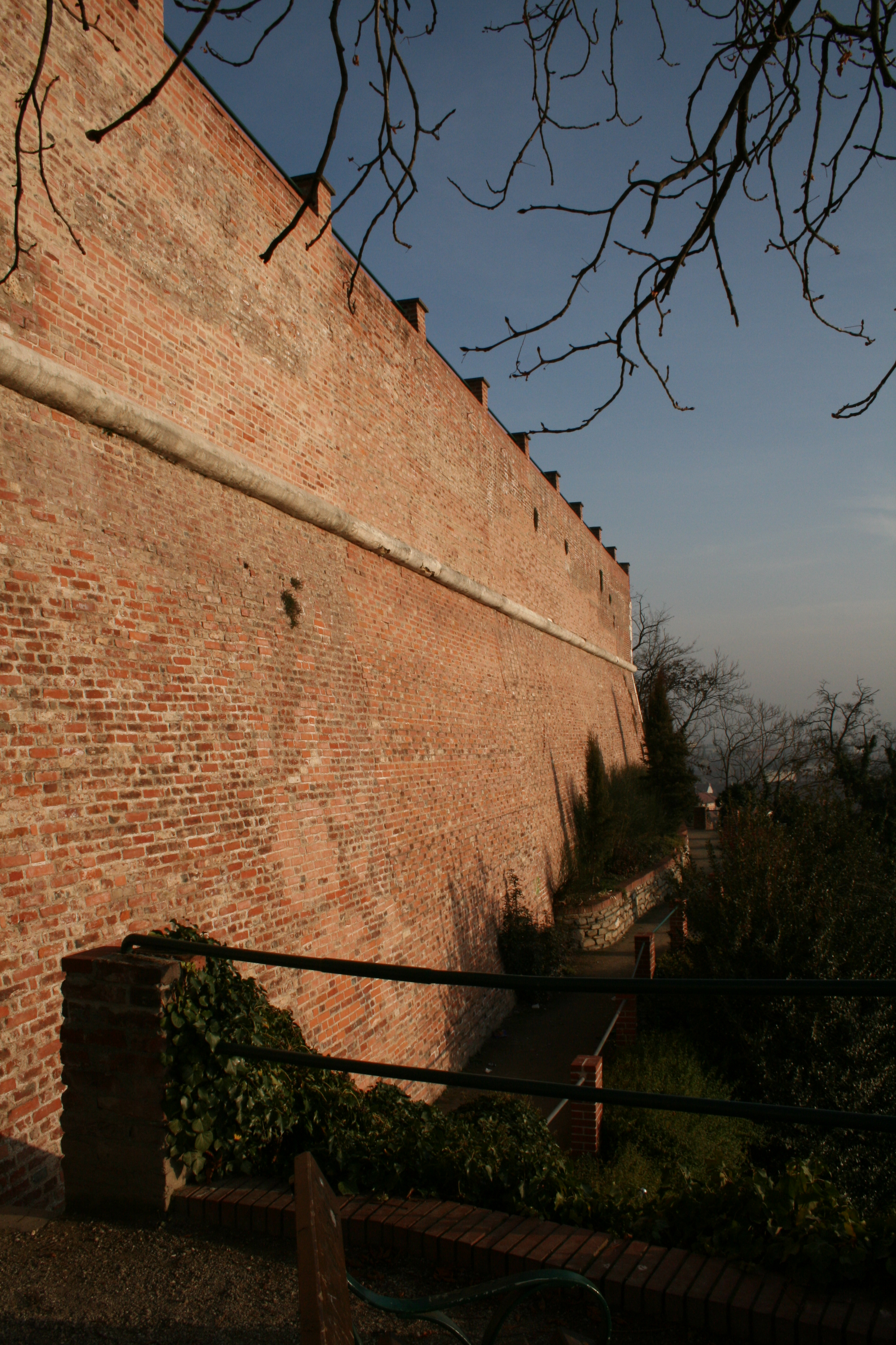 Graz, Austria: Bastionsanlagen am Schlossberg (beim Liechtensteingarten, unterhalb des Uhrturms)